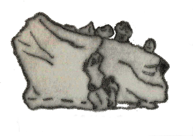 Illustration of a fossil of Fabrosaurus